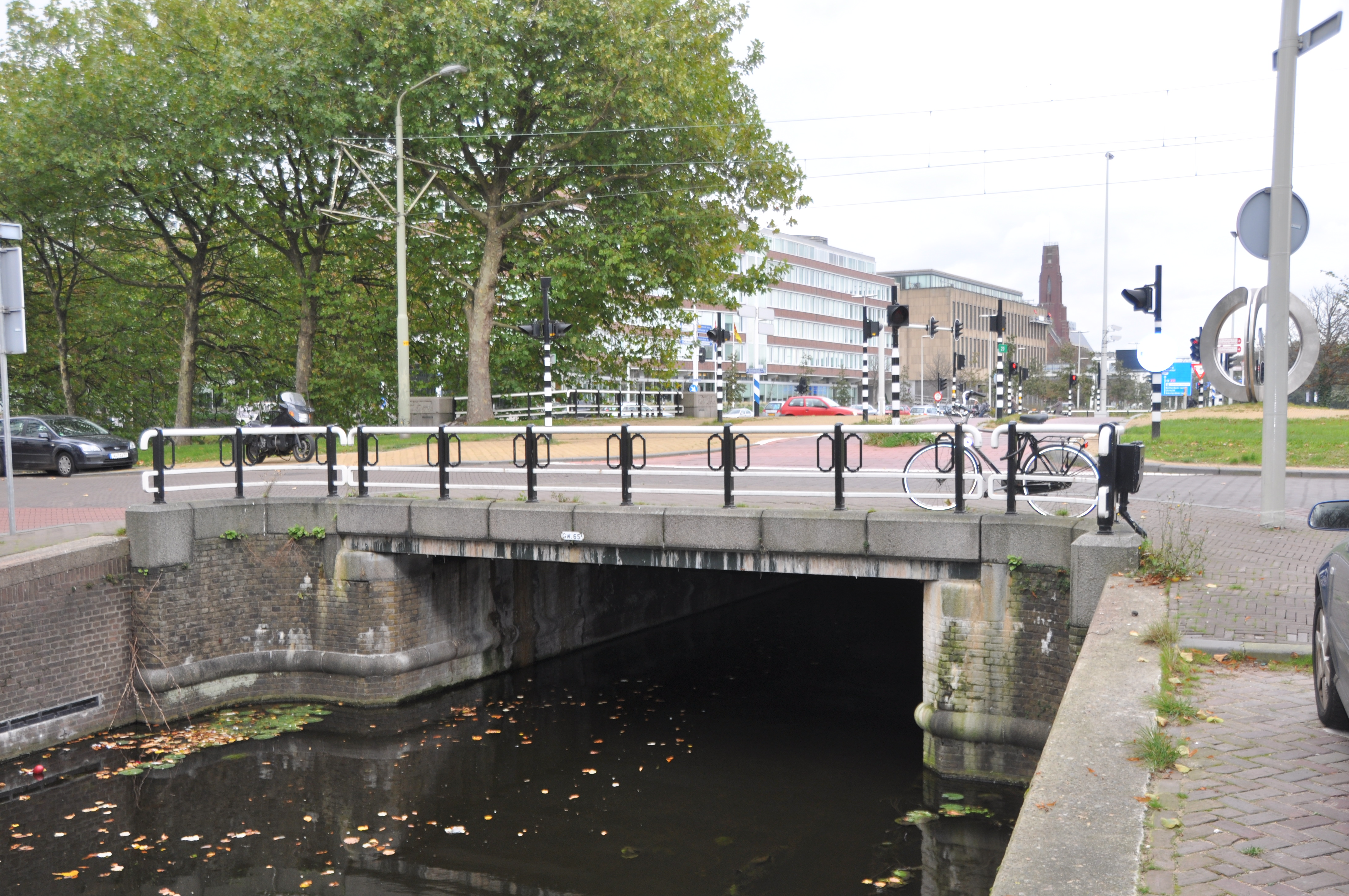 Bruggen in Den Haag.